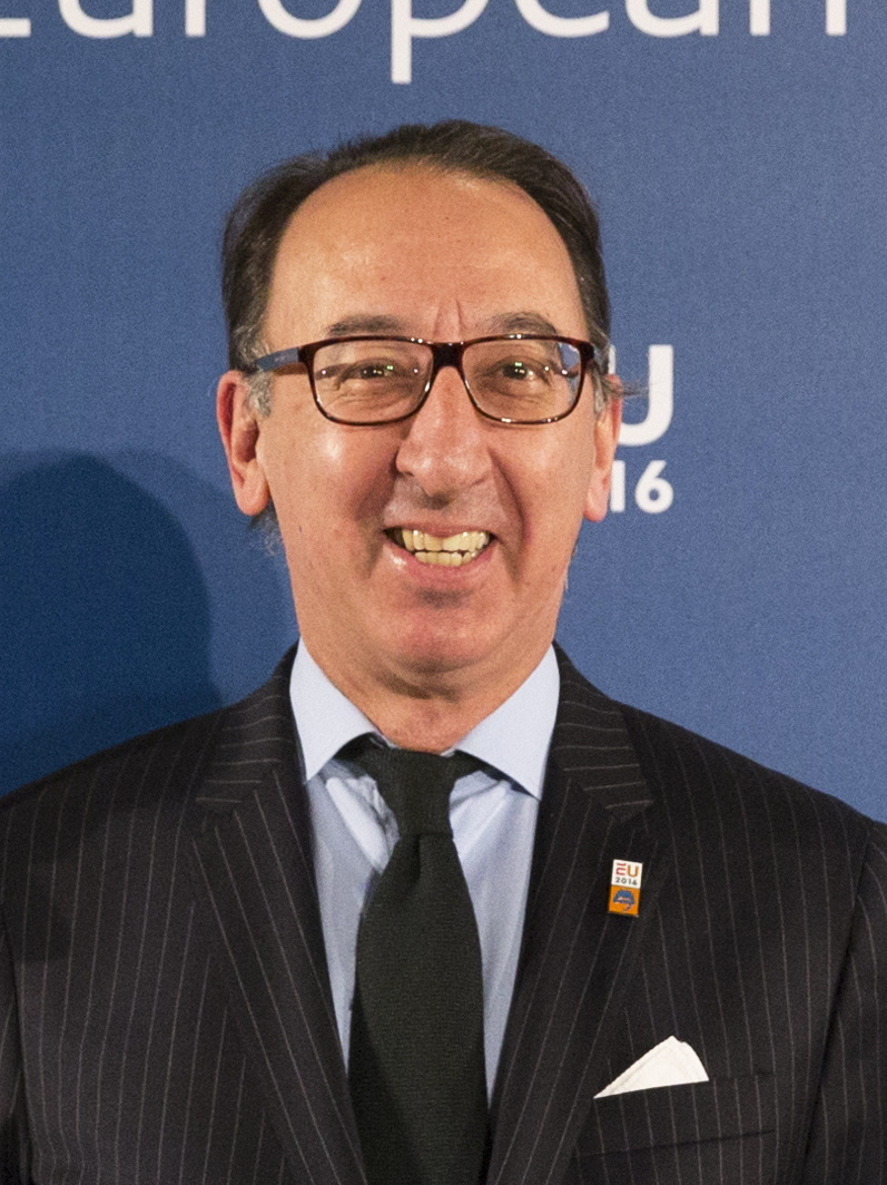 Amsterdam, 5 februari 2016 / Amsterdam 5th of Februari. Minister van Defensie Jeanine Hennis-Plasschaert en Frederica Mogherini ontvangen de ministers van Defensie voorafgaand aan de informele bijeenkomst van de Europese ministers van Defensie in het Scheepvaartmuseum in Amsterdam. Dutch minister of Defense Jeanine Hennis-Plasschaert and Frederica Mogherini meeting with ministers of Defence prior to the informal meeting of the ministers of Defence in the Scheepvaart Museum in Amsterdam. Jorge Domecq